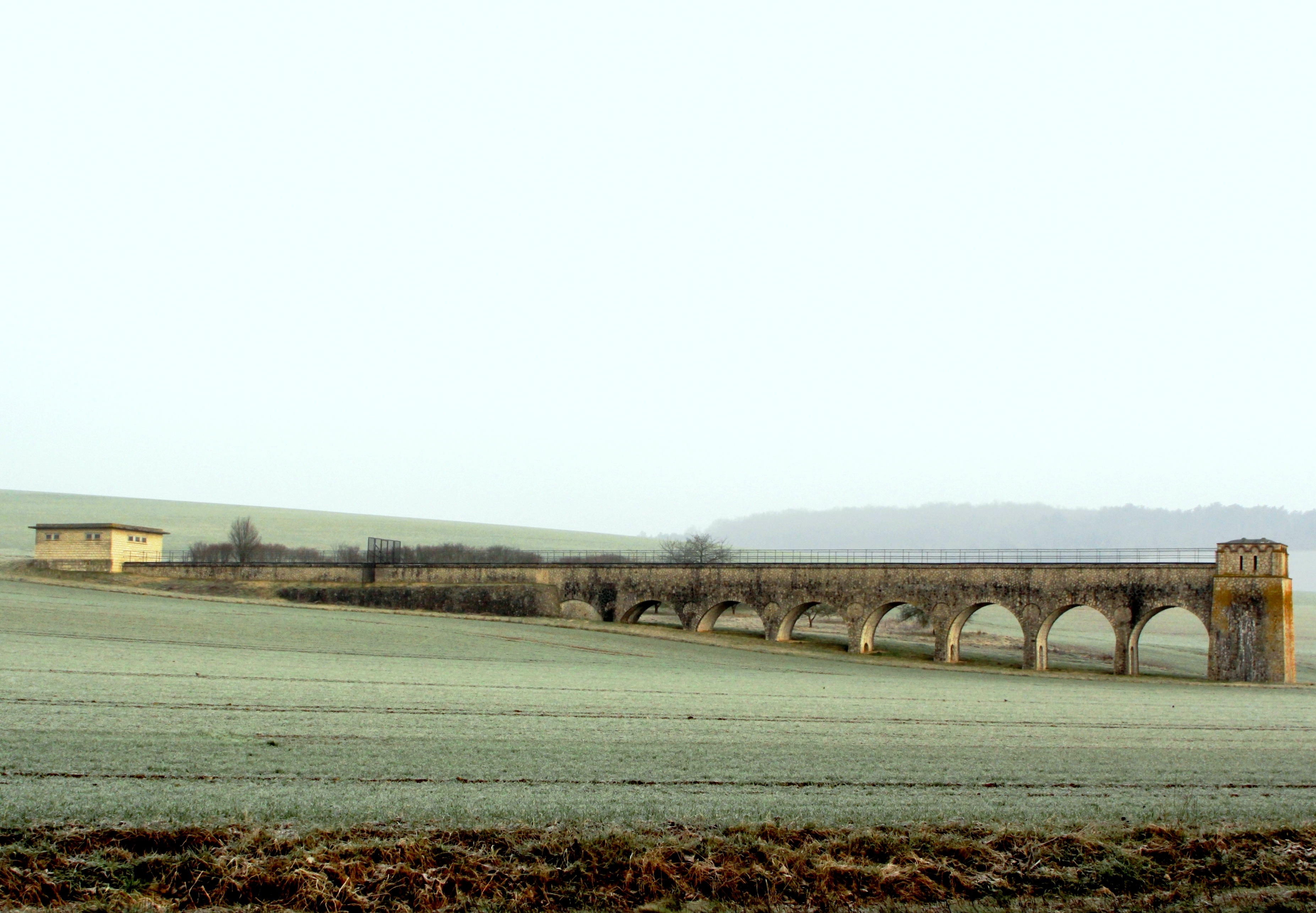 Aqueduc de la Vanne le syphon à Chigy tête aval